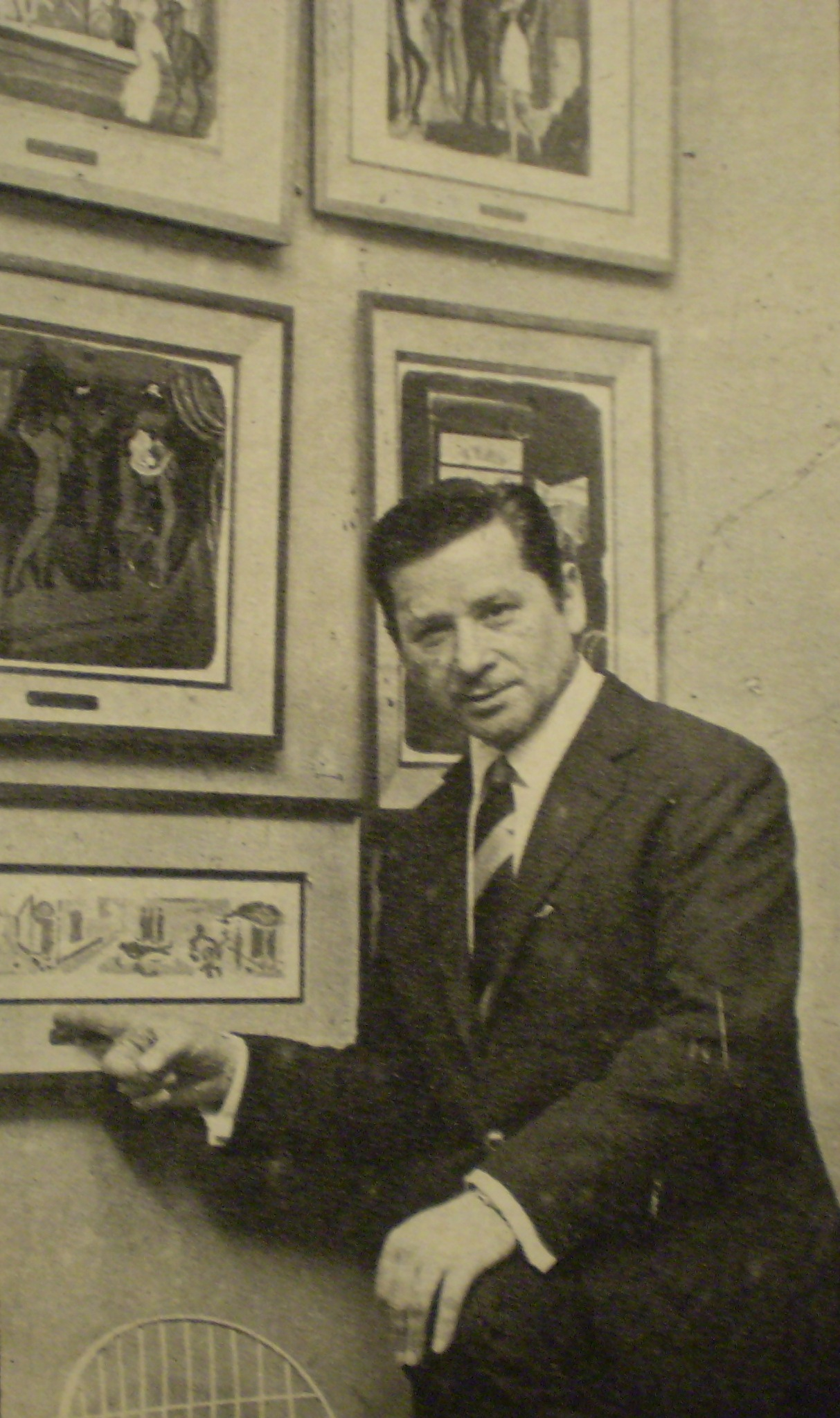 Ben Molar